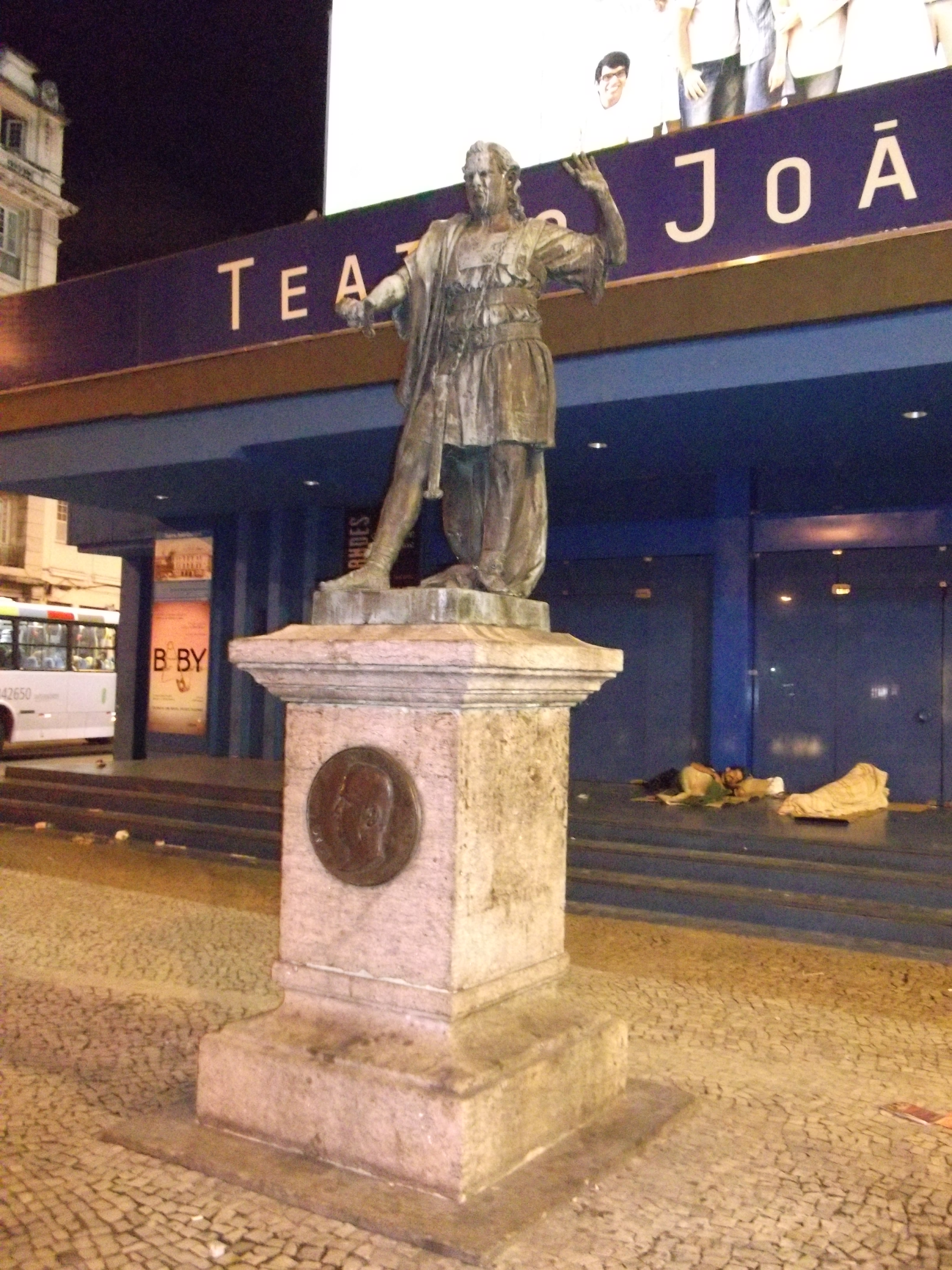 Estátua de João Caetano, em frente ao Teatro João Caetano, cidade do Rio de Janeiro, Brasil.